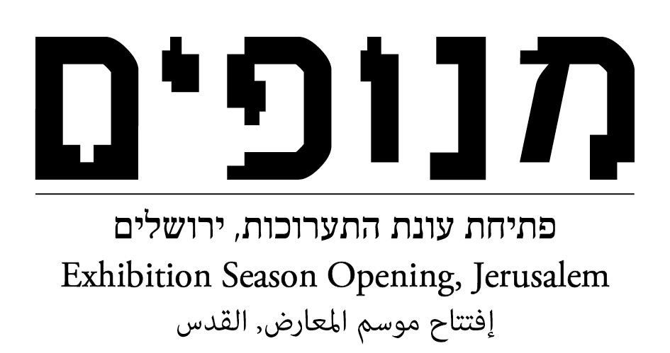 לוגו מנופים